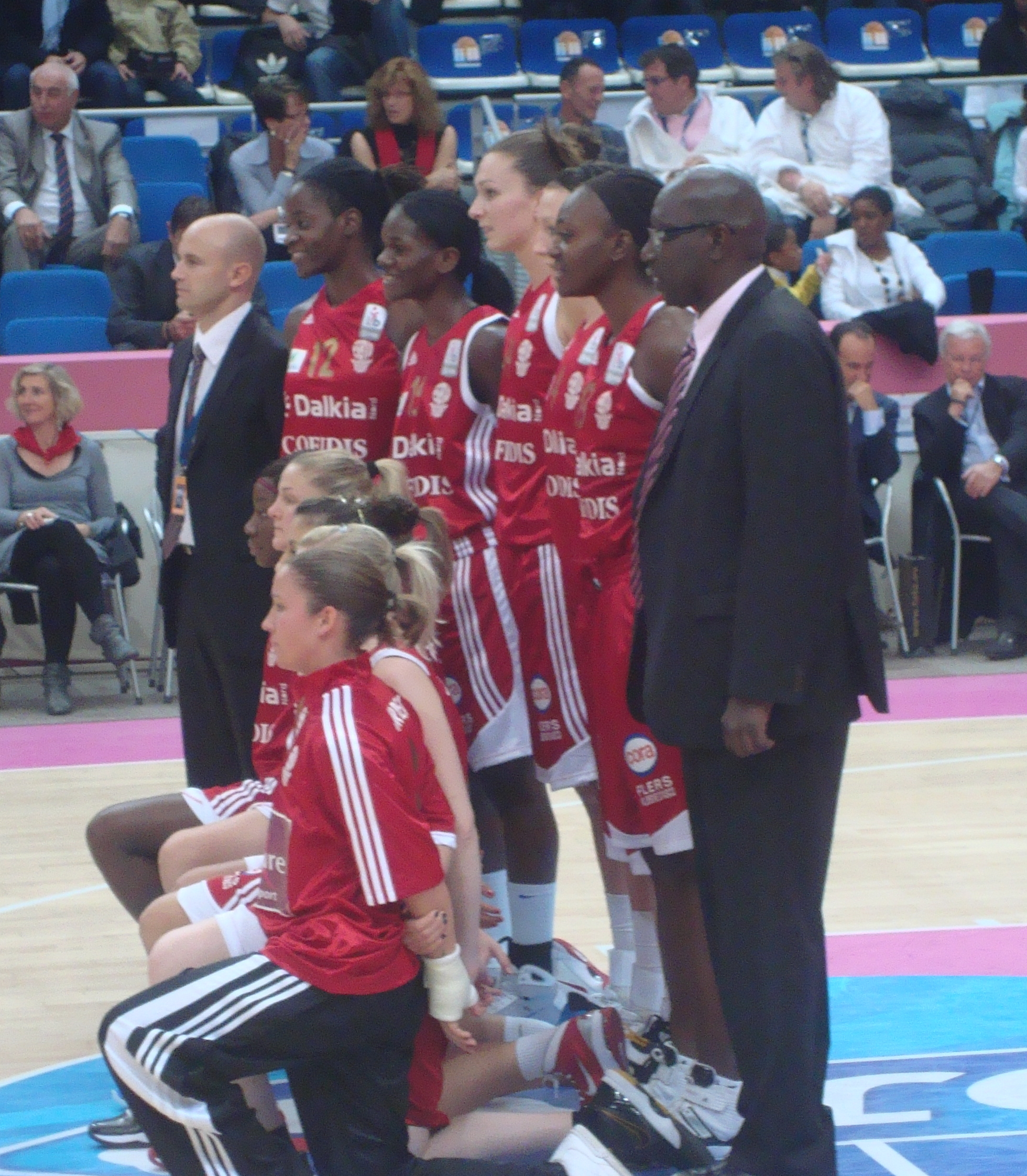 L'équipe féminine de basket-ball de Villeneuve d'Ascq lors de l'Open LFB 2010.